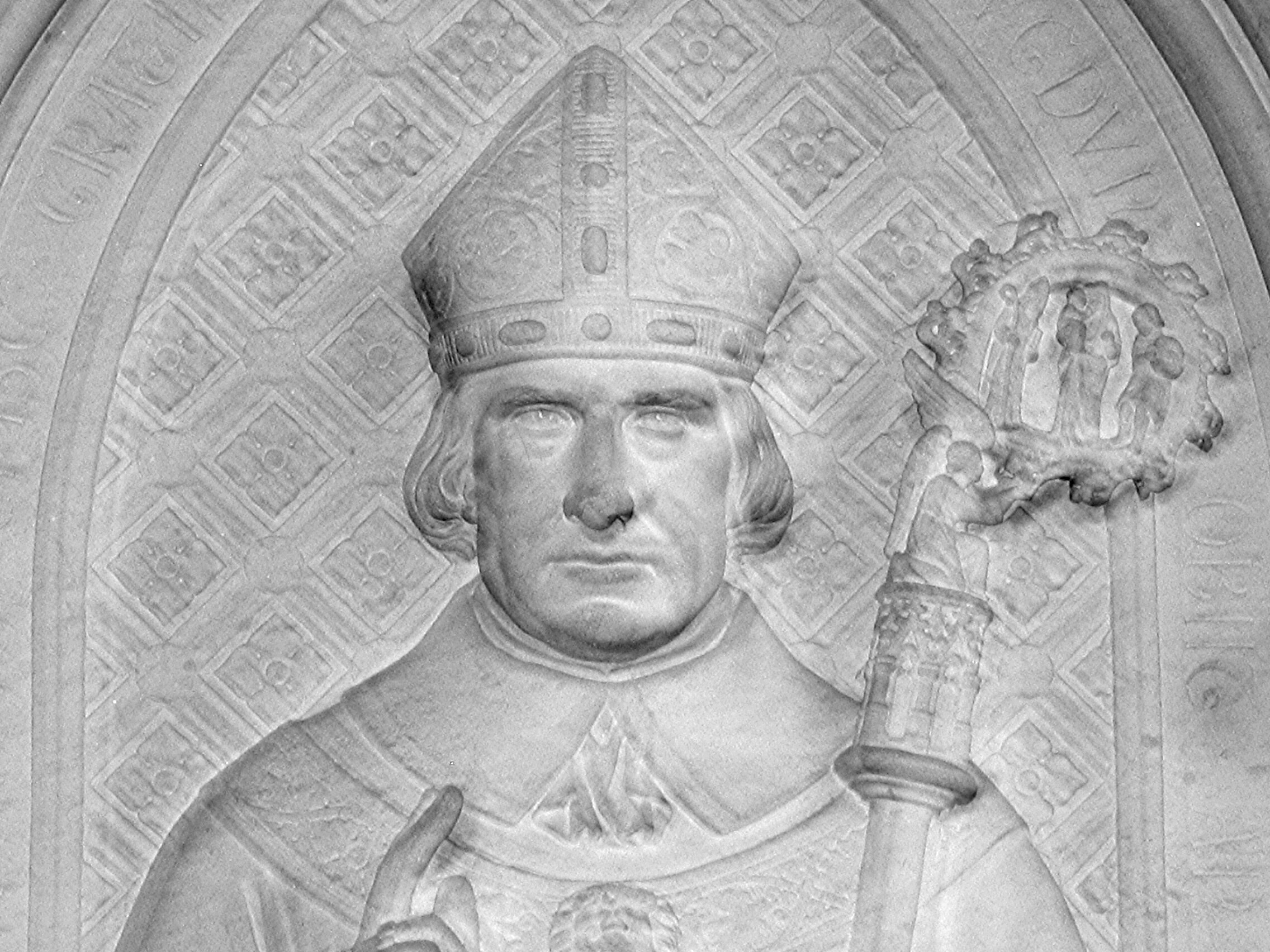 Mgr JMA GINOULHIAC - stèle cathédrale St-Jean - LYON